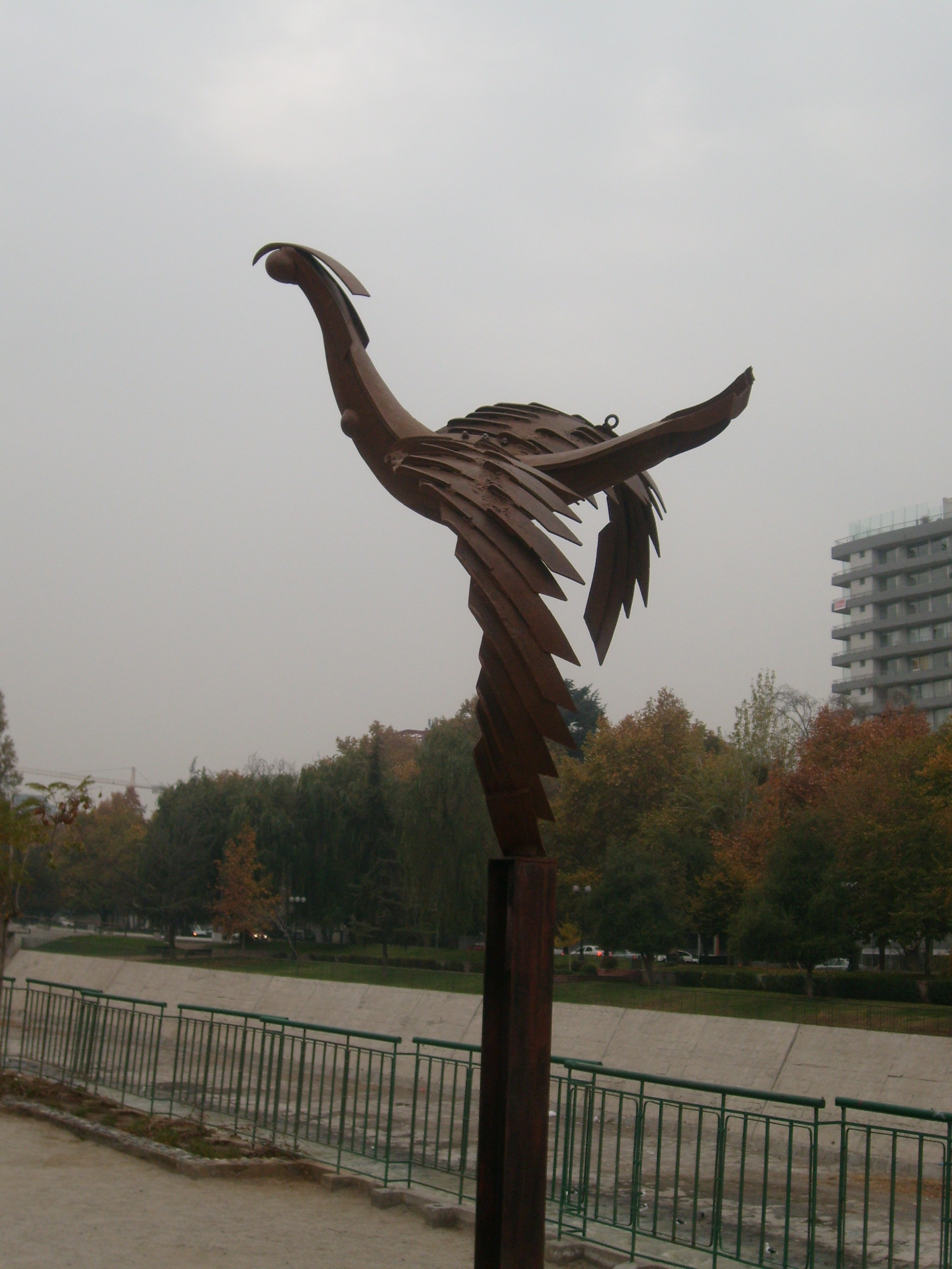 El obsceno pájaro de la noche, obra del chileno Sergio Castillo, durante su exposición en el Museo Parque de las Esculturas de Providencia, Santiago de Chile